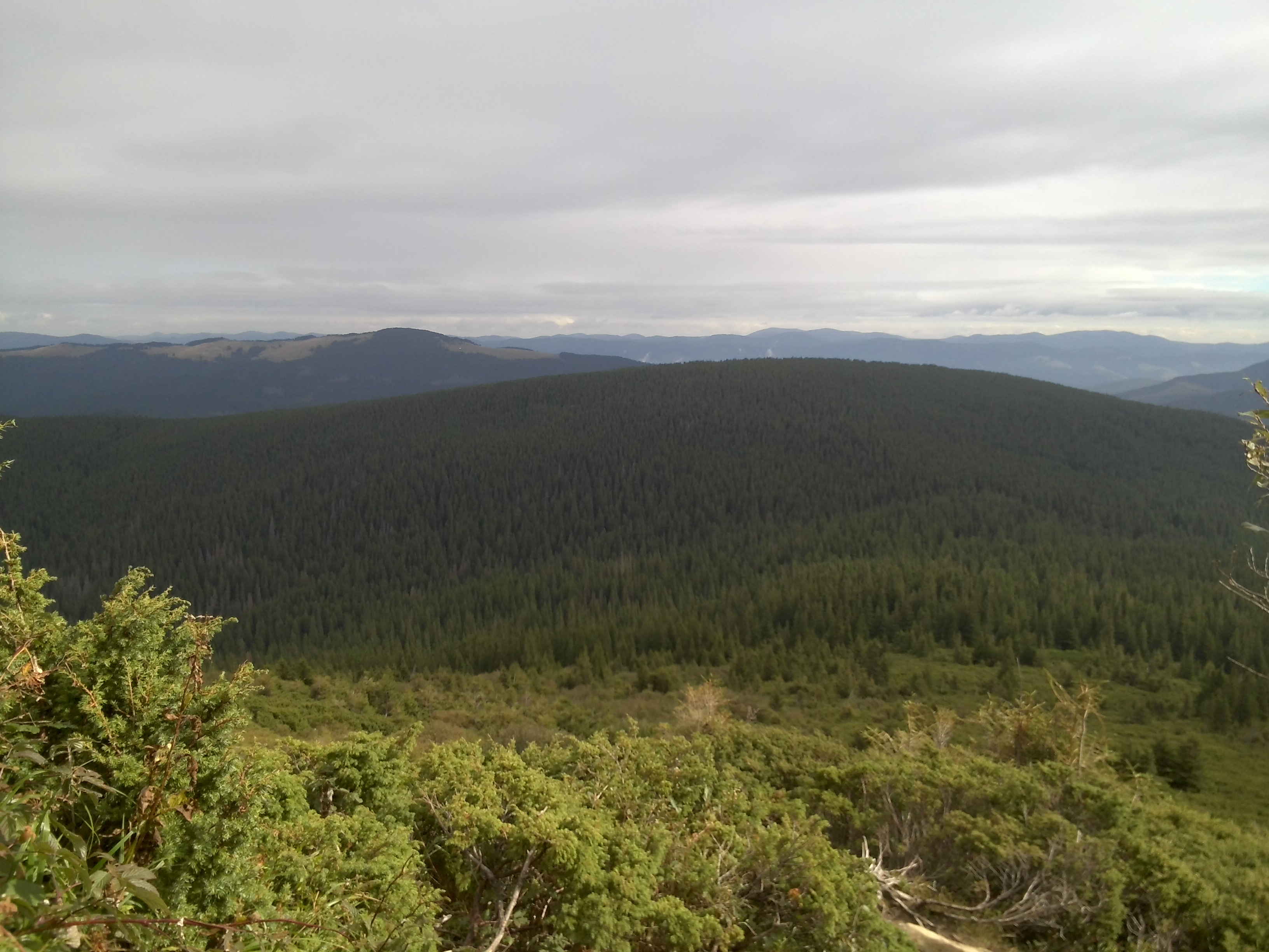 На Говерлу